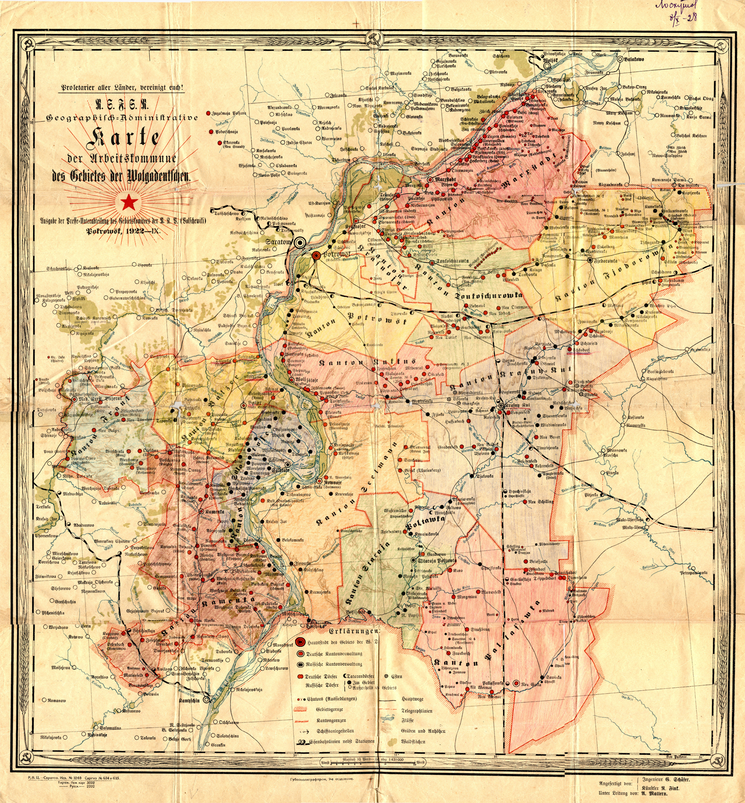 Рабочая карта землеустроителя, изданная в сентябре 1922 года (на немецком языке).